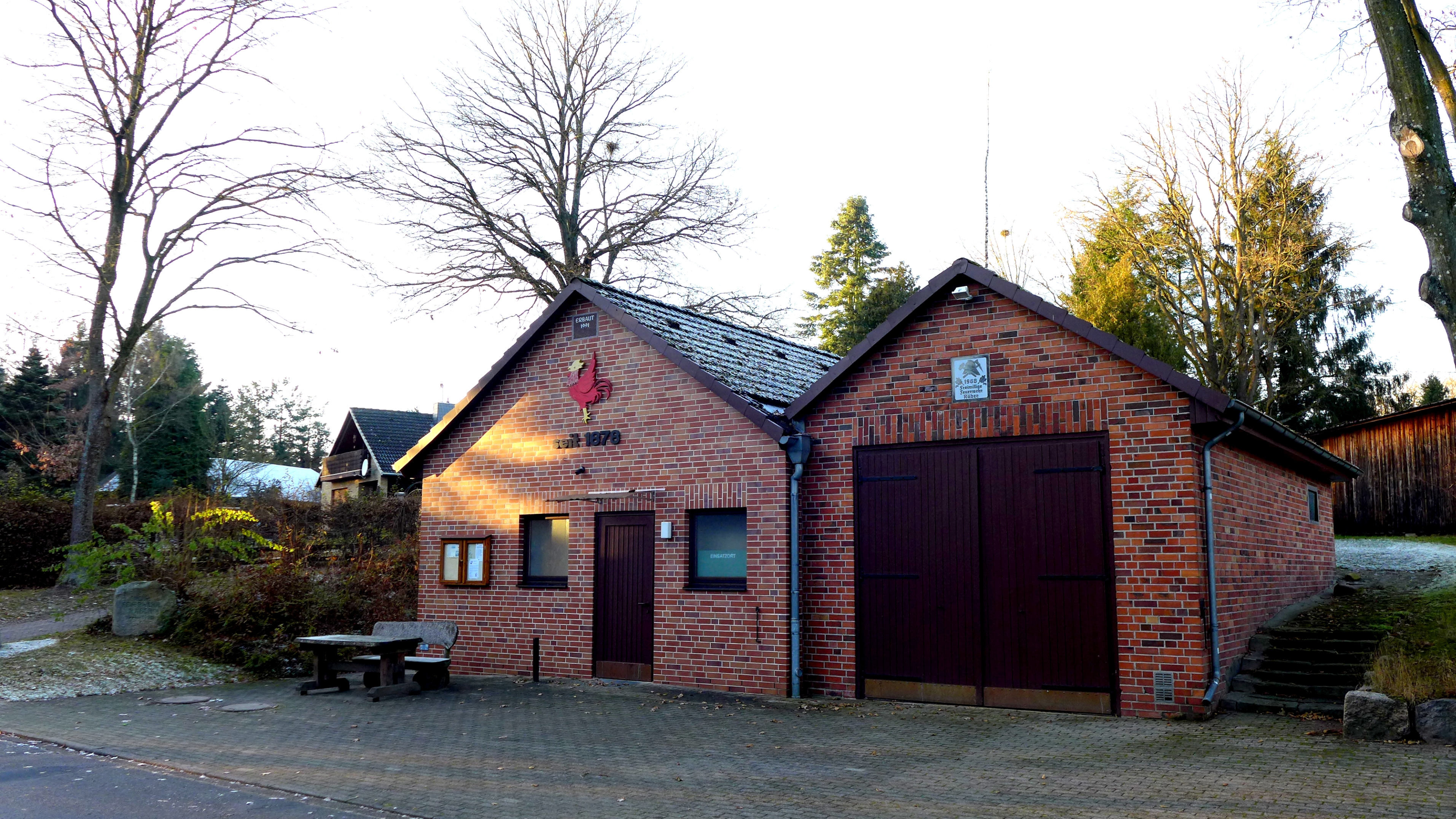 Gerätehaus der Freiwilligen Feuerwehr Räber im Suderburger Land. Gründungsjahr der Wehr 1878. Aufnahmedatum 2016-11.